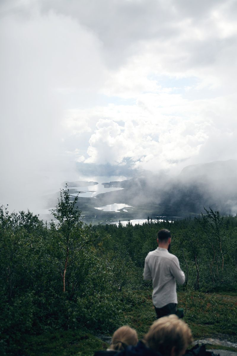 Jägmästarstudenter blickar ut över Kvikkjokksdeltat. foto: Johanna Hägglund